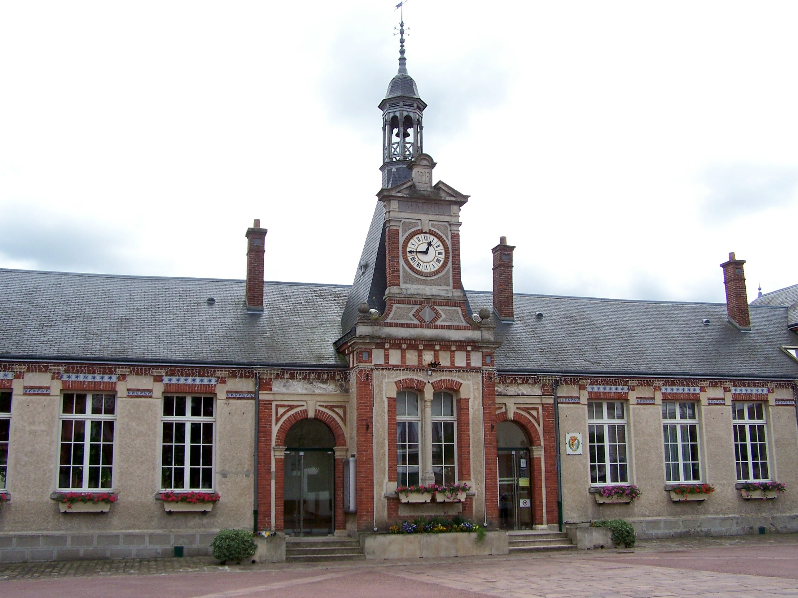 Mairie du Perray-en-Yvelines, Yvelines, France